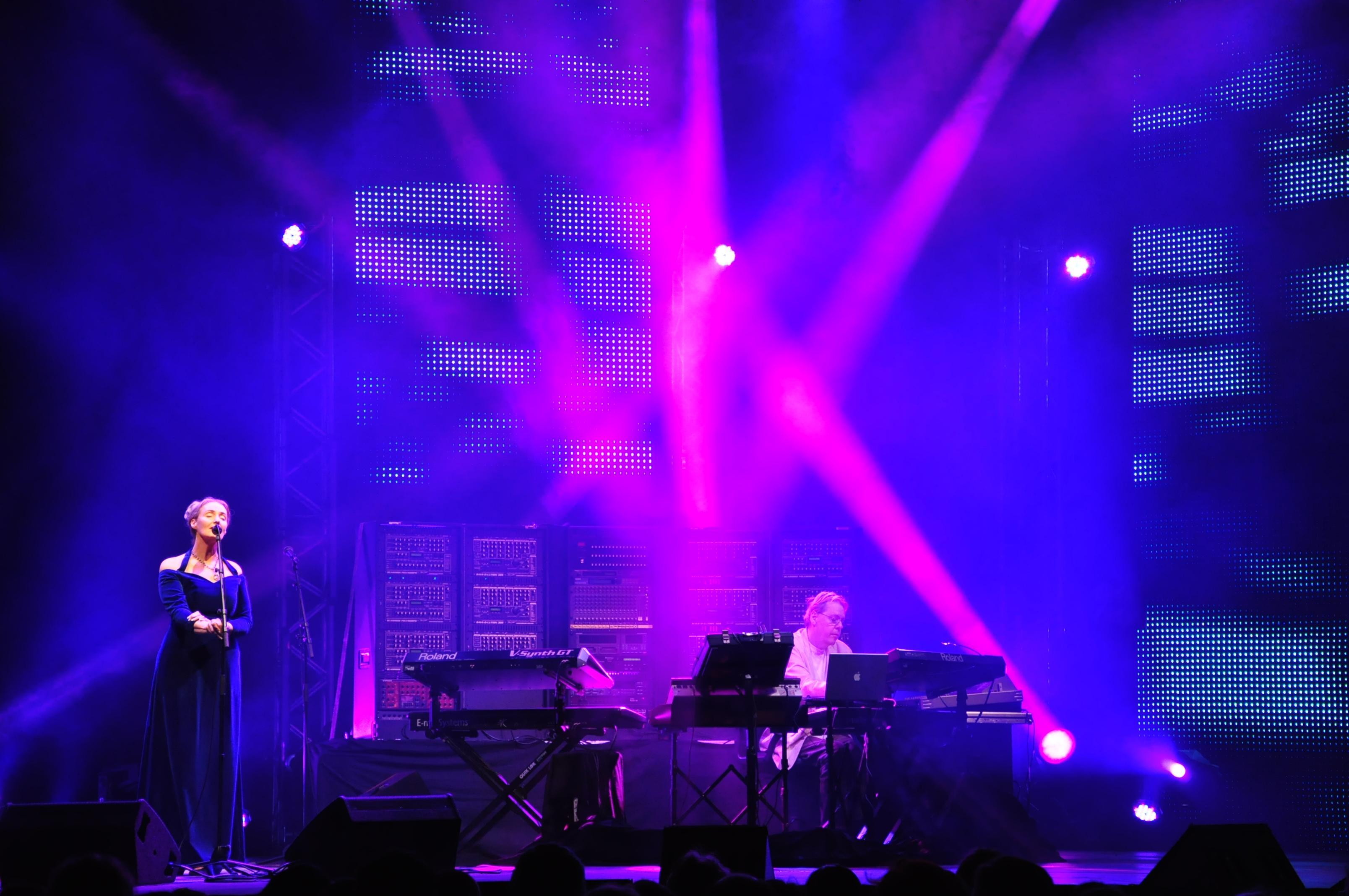 Lisa ?piewa, Klaus sprawdza Facebook.